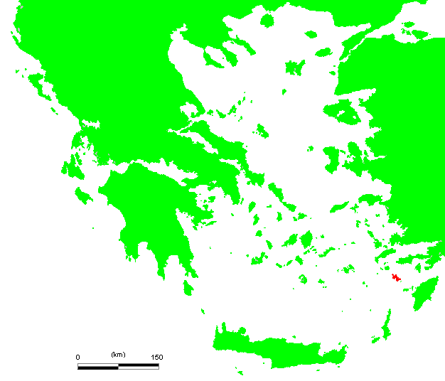 GR Tilos.PNG (Greek island)